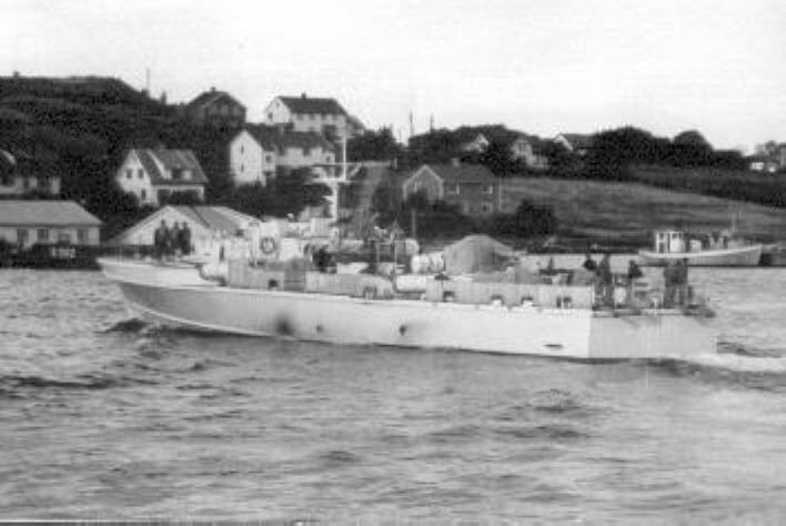 Deutsches Torpedo-Schnellboot der Jaguar-Klasse (140) des 5. Schnellbootgeschwaders in der Ostsee um 1960.